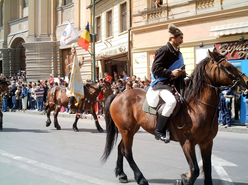 Junii Dorobanţi - vătăşelul şi stegarul